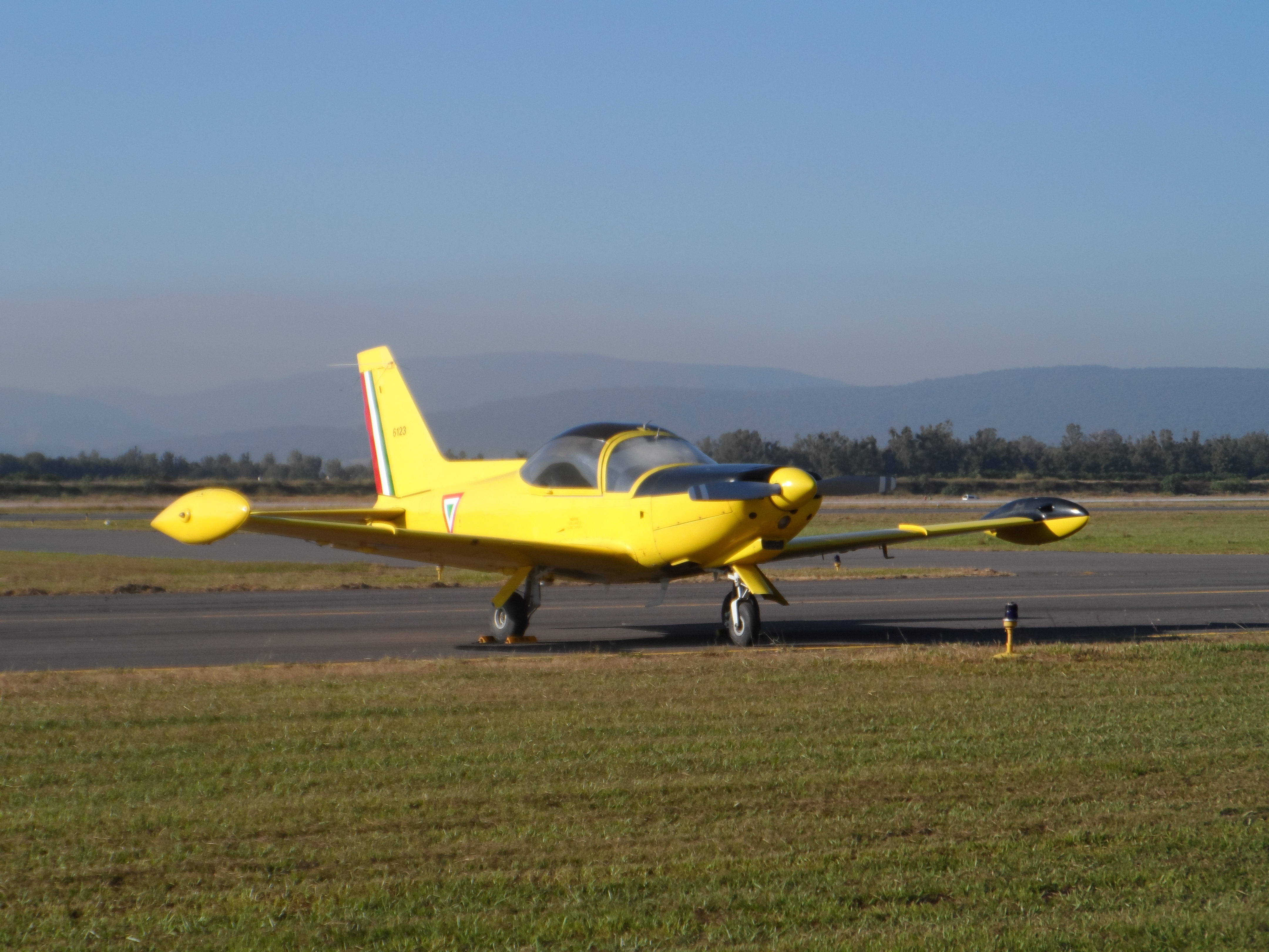 Avión Aermacchi SF-260 de la Fuerza Aérea Mexicana en la exhibición estática del "Espectáculo Aéreo Jalisco 2017", relizado el 28 de Octubre del 2017 en la BAM No. 5, en Zapopan, Jalisco.